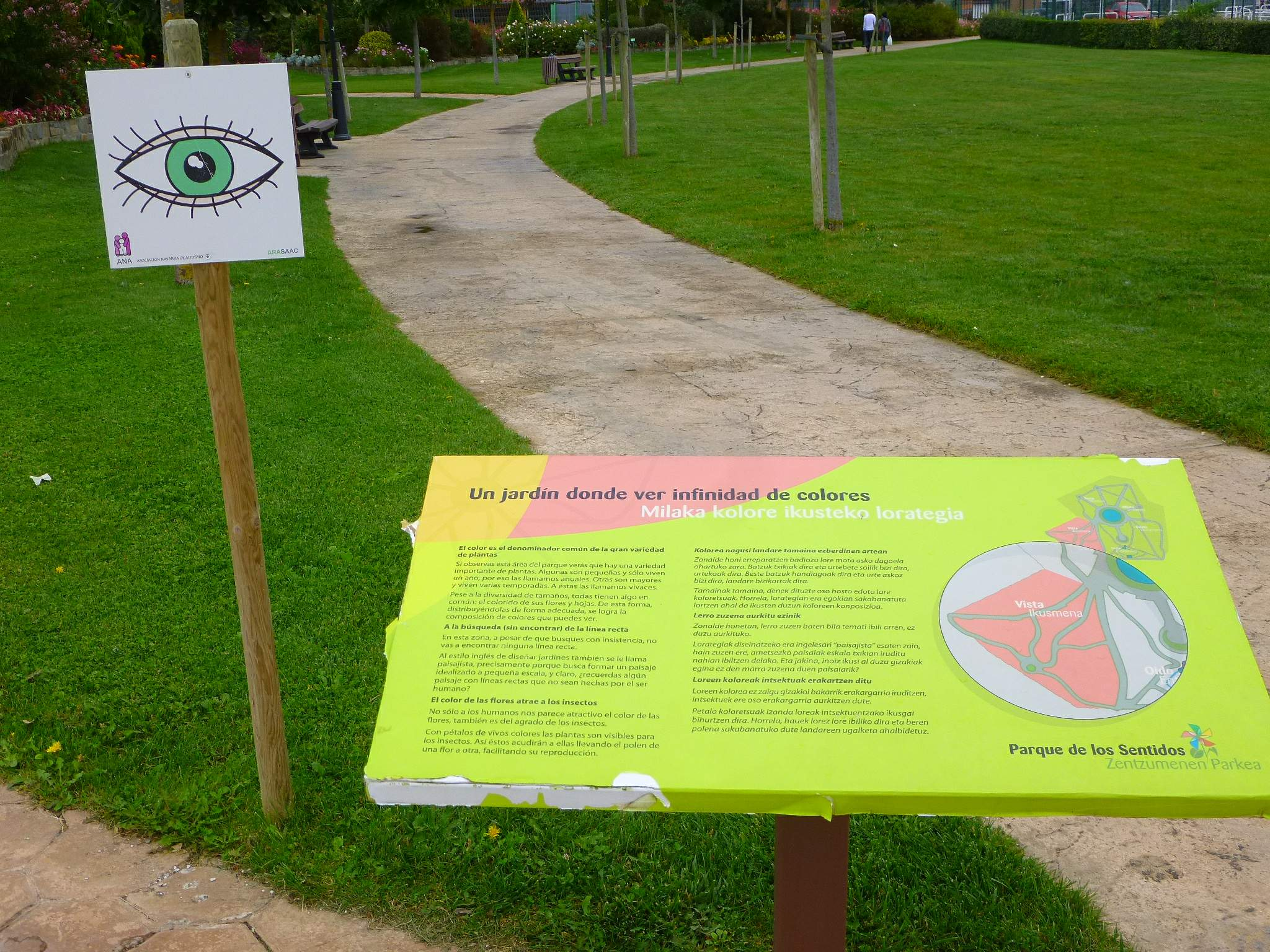 Parque de los Sentidos (Noáin, Navarra)